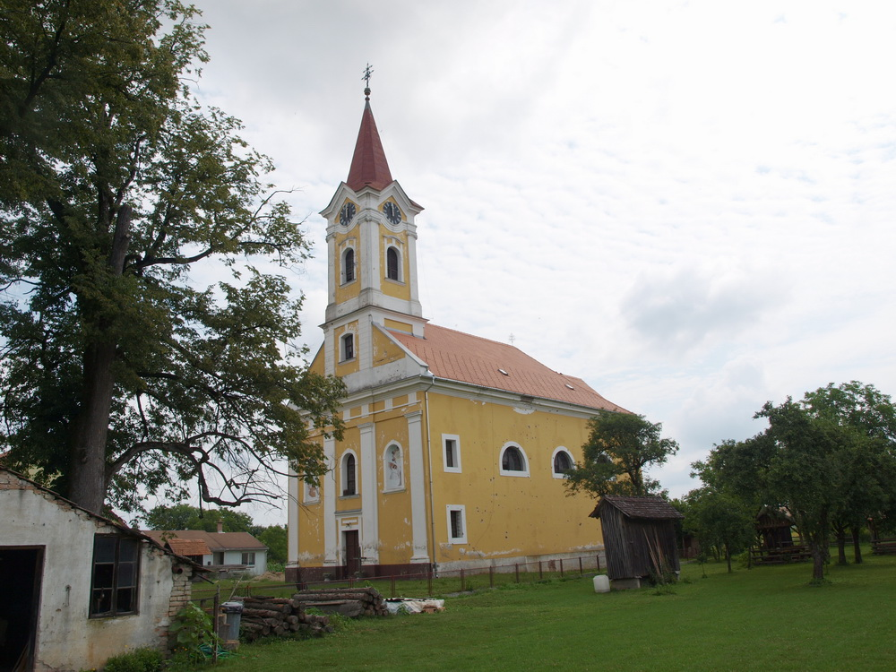 Crkva u selu Krapje, Sisačko-moslavačka županija.